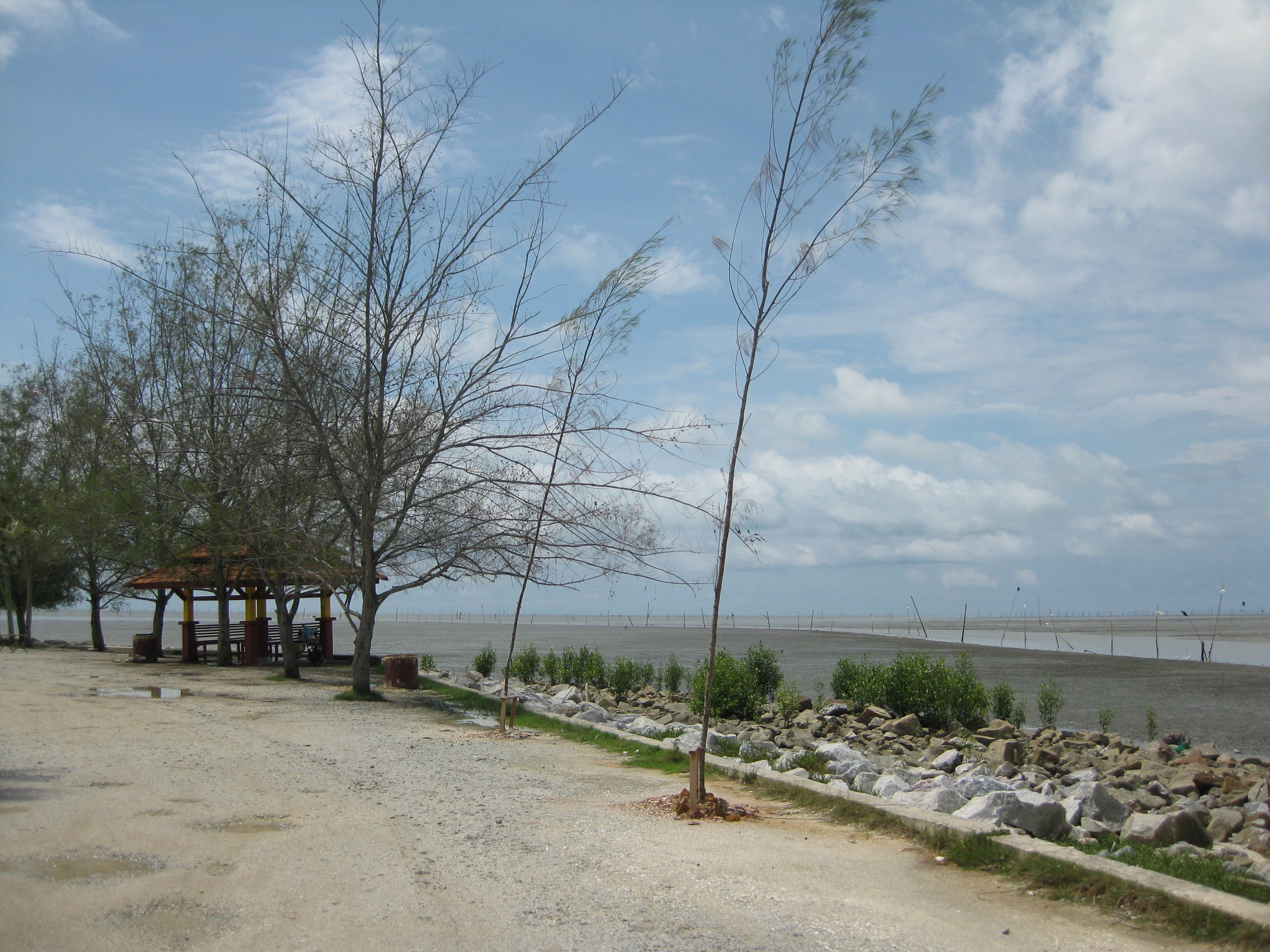 Las vistas en Playa de Bagan Nakhoda Omar (BNO)